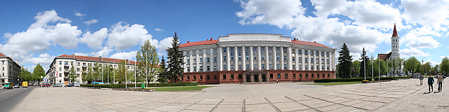 Šiaulių miesto centrinės aikštės panorama